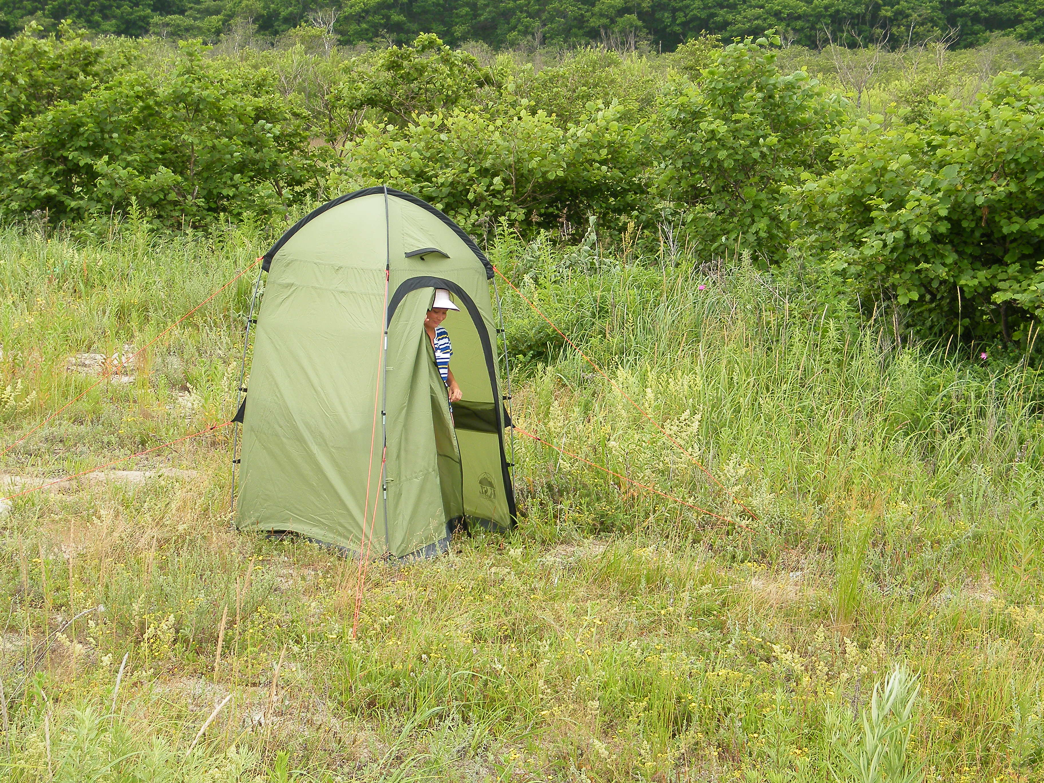 Походный сортир